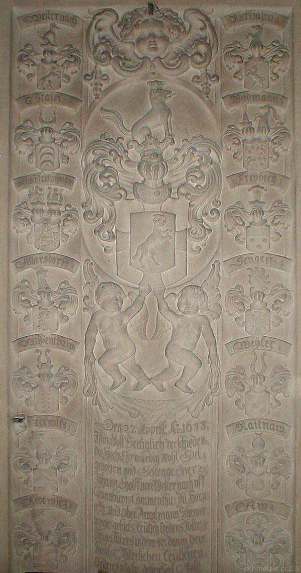 Westernach-Epitaph in der Stadtpfarrkirche St. Nikolaus in Gundelsheim (Württemberg).